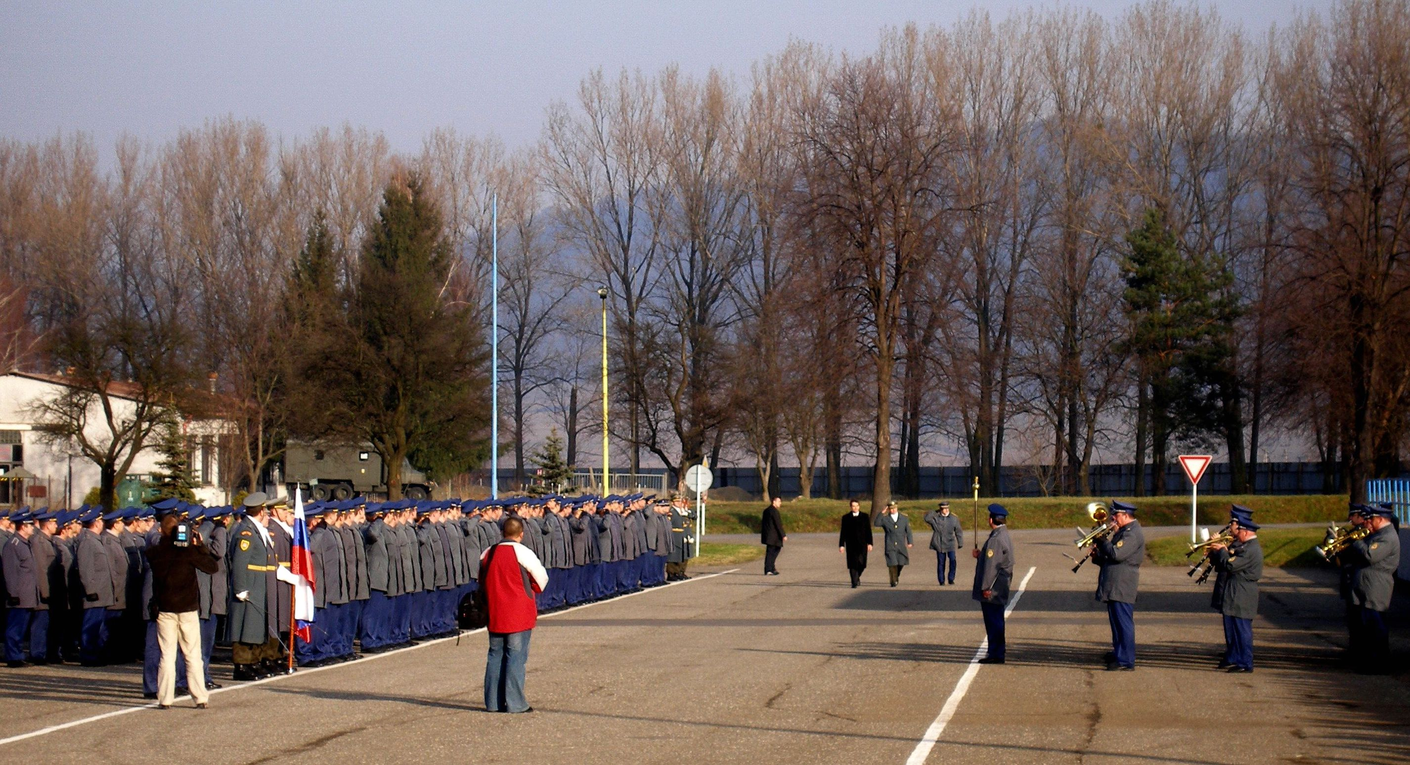 Prešov časť Nižná Šebastová,kasárne SNP